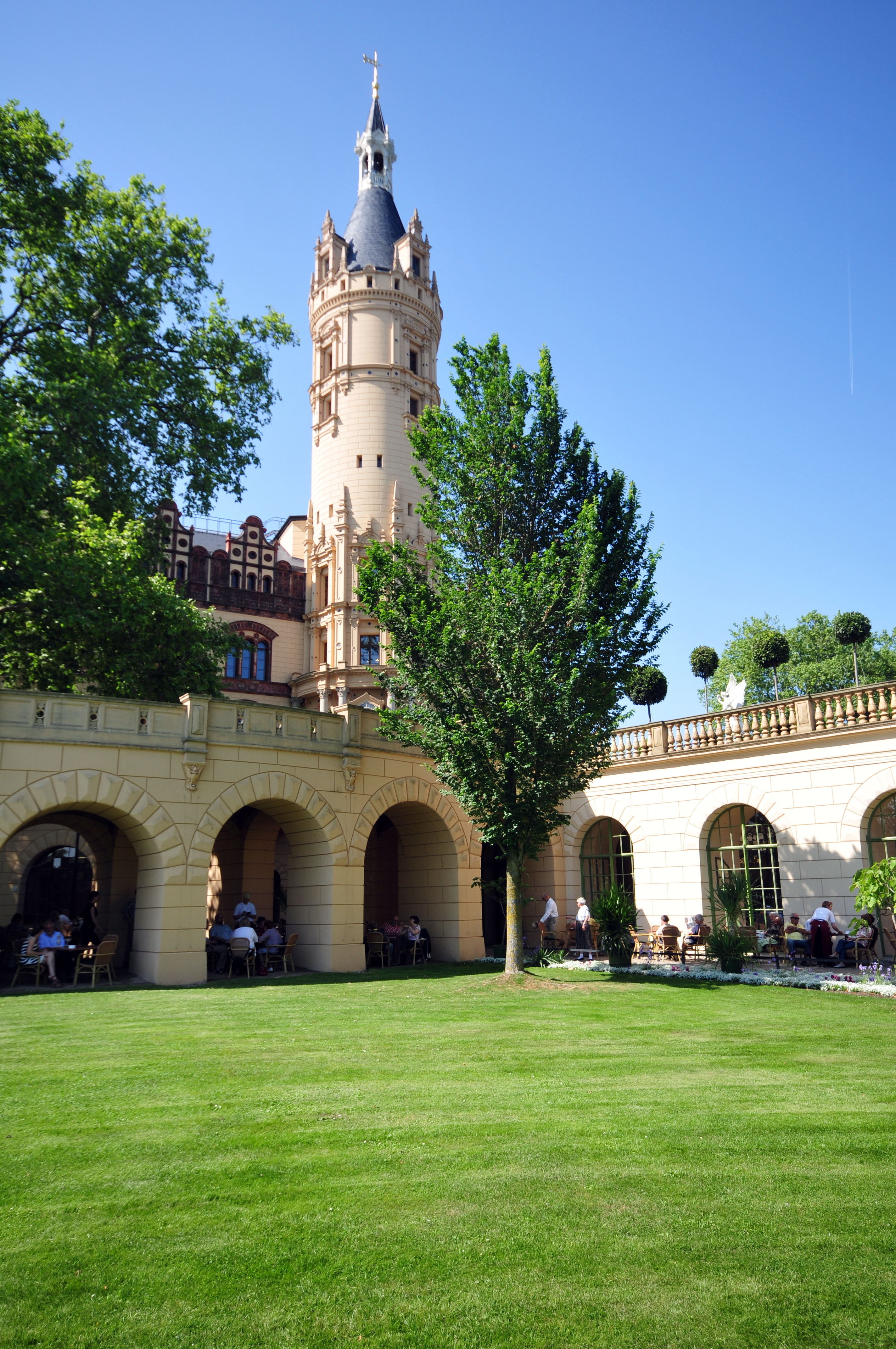 Schweriner Schloß; Orangerie und Schloßgarten